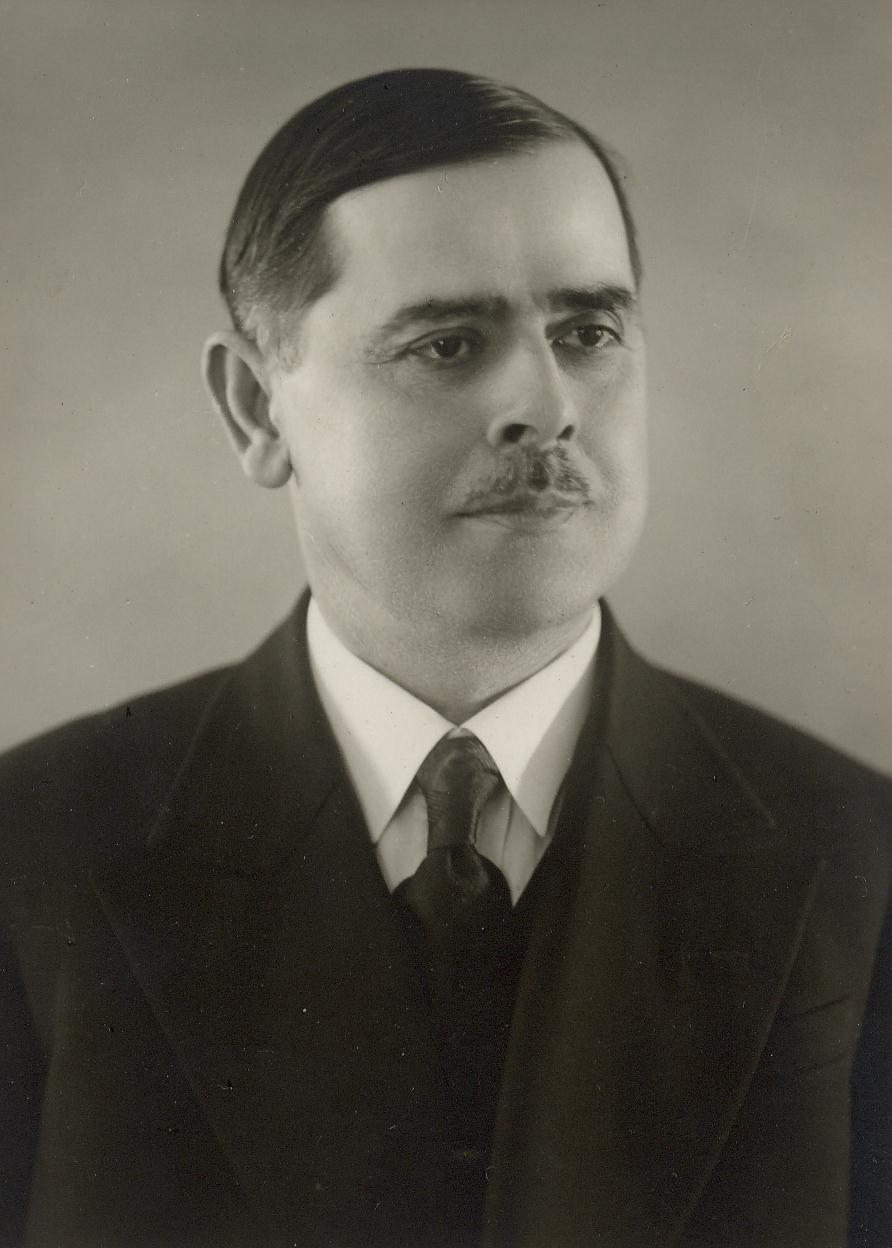 Теодор Капидан